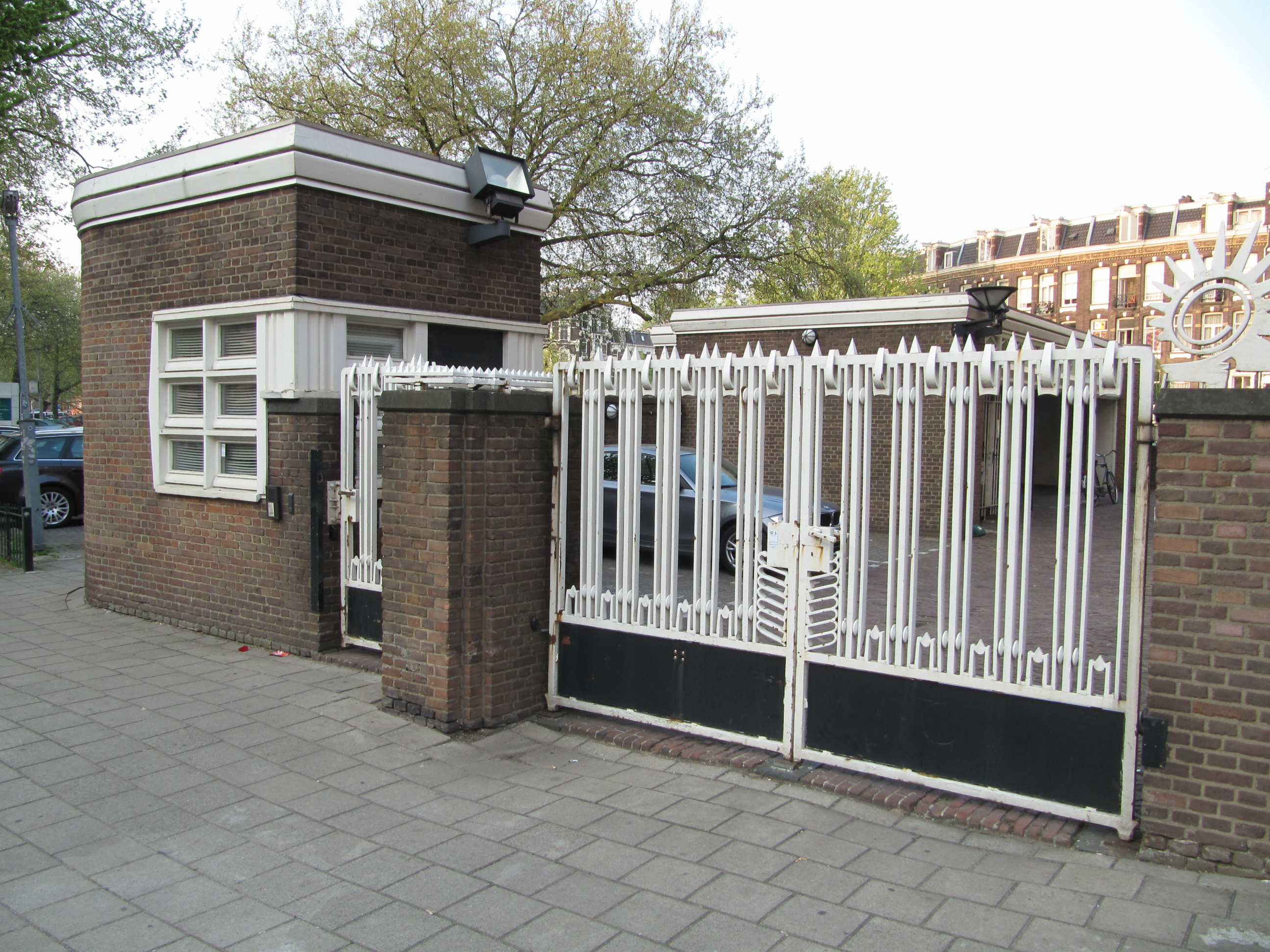 Noordwestelijk van het voormalige hoofdgebouw van de Gemeentetram opgetrokken utilitair bijgebouw: portiersloge en hek